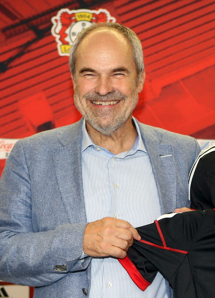 LG전자가 독일 프로축구 분데스리가의 명문 클럽 '바이엘 04 레버쿠젠'을 공식 후원한다. 29일(독일 현지시간) 팀구장 '바이 아레나'에서 열린 조인식에서 (왼쪽부터) 볼프강 홀츠호이져(Wolfgang Holzhauser)단장, 손흥민 선수, LG전자 글로벌마케팅부문장 김기완 부사장이 'LG'로고가 새겨진 셔츠를 들고 기념촬영을 하고 있다. ※ LG전자 뉴스룸 에서 관련 보도자료를 확인하실 수 있습니다.